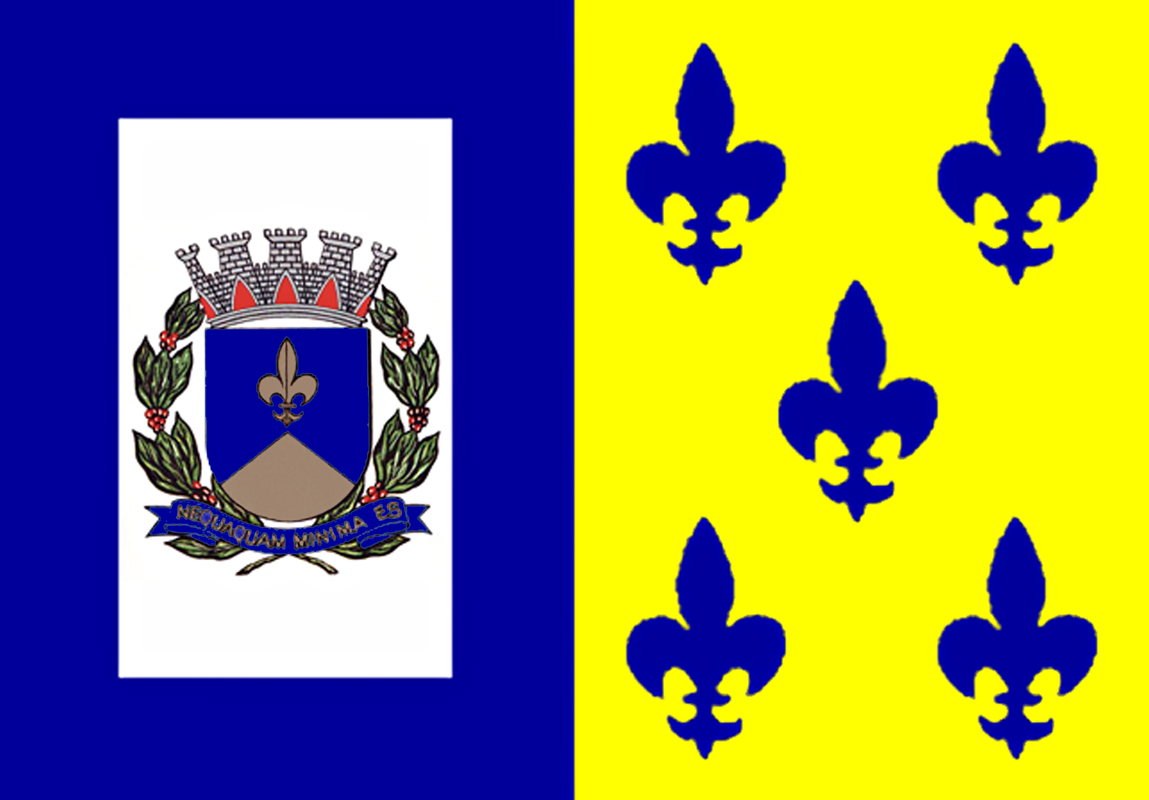 Bandeira do município de: Descalvado, São Paulo, Brasil